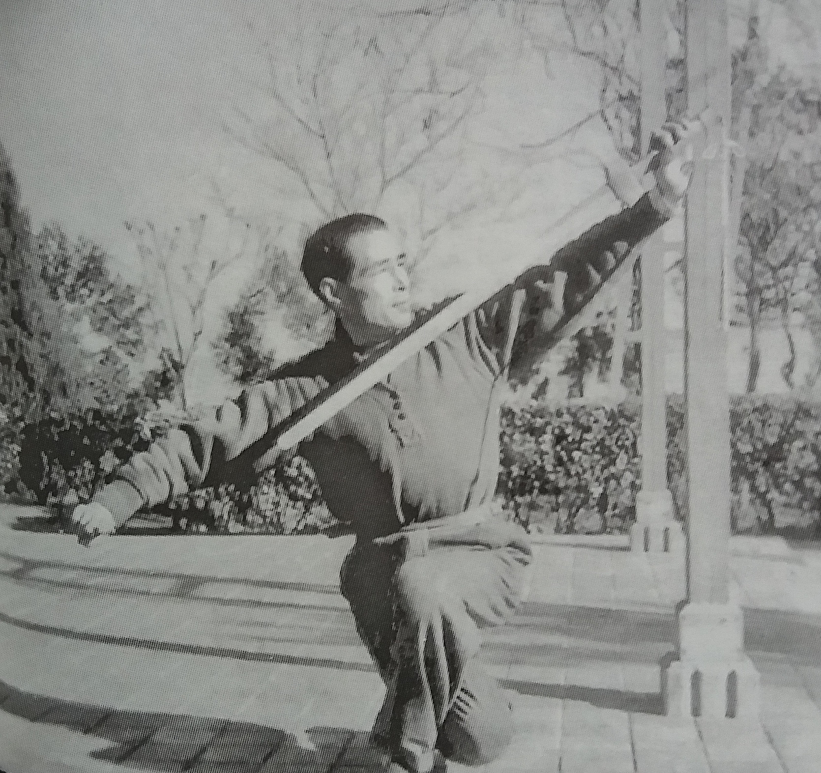 中文（中国大陆）: 在疗养院内练剑的金焰